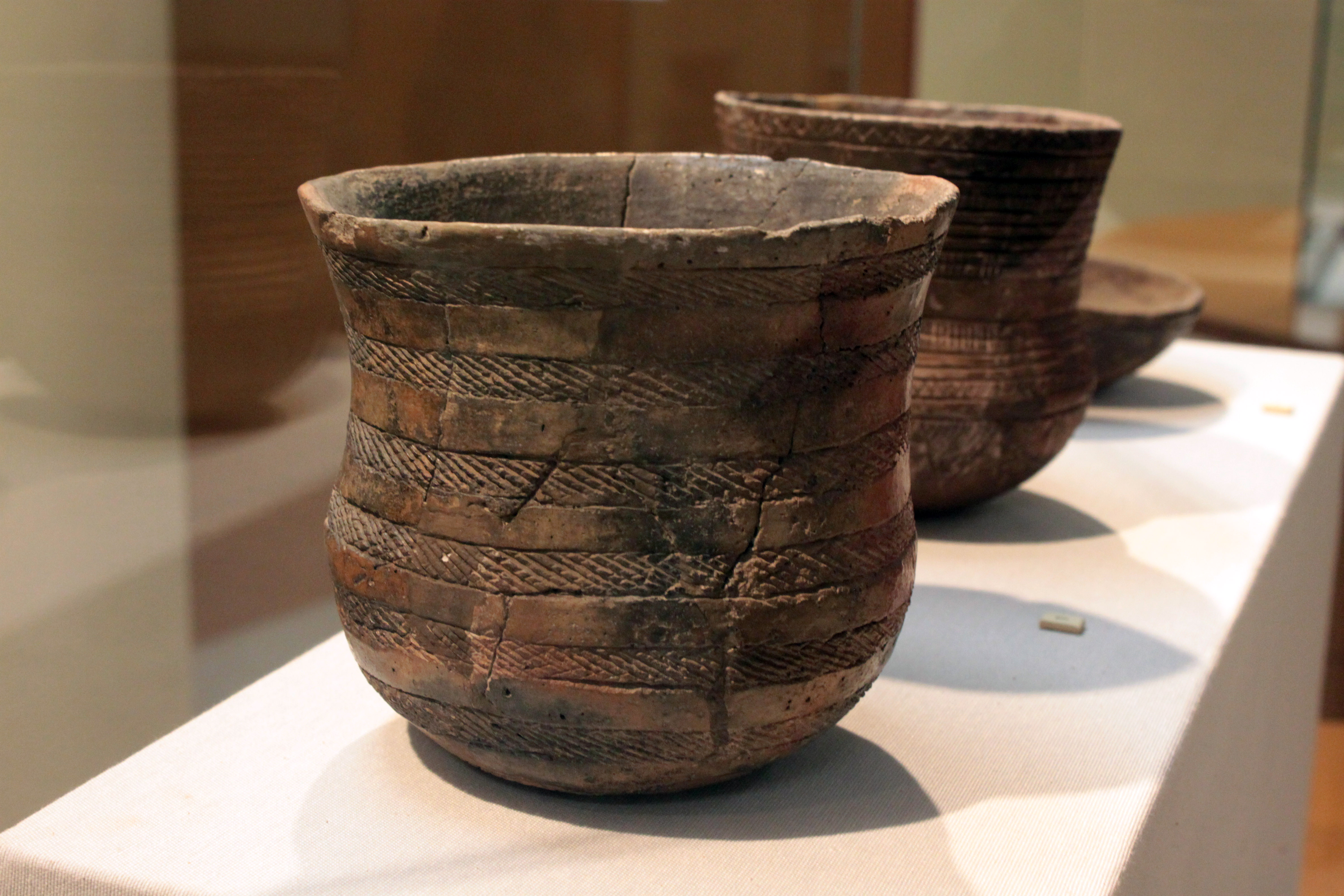 Vaso campaniforme datado entre los años 2200-1800 a.C procedente del yacimiento de la Sima de la Pedrera de Benicull-Polinyá de Xúquer. Fondos del Museo de Prehistoria de Valencia, Comunidad valenciana, España.